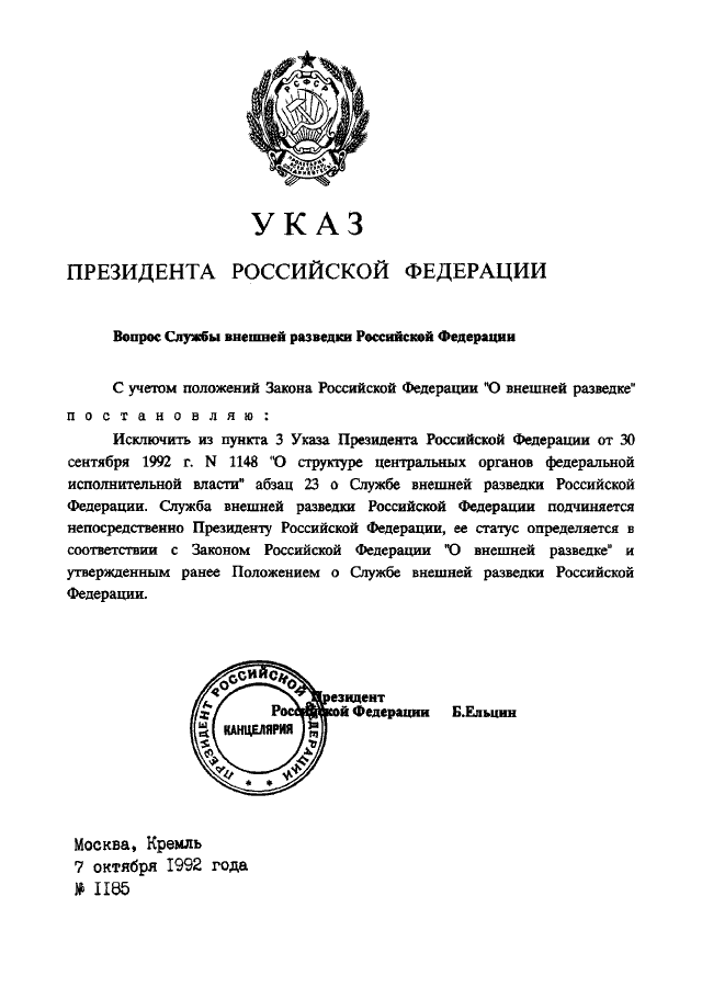 Copie scannée de l’Oukase n°1185 du 07.10.1992 du président de Russie portant sur le changement du statut administratif et juridique du SVR